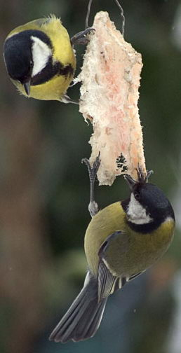 Species Parus major Photo taken in Rumia, Poland by Adam Kumiszcza.